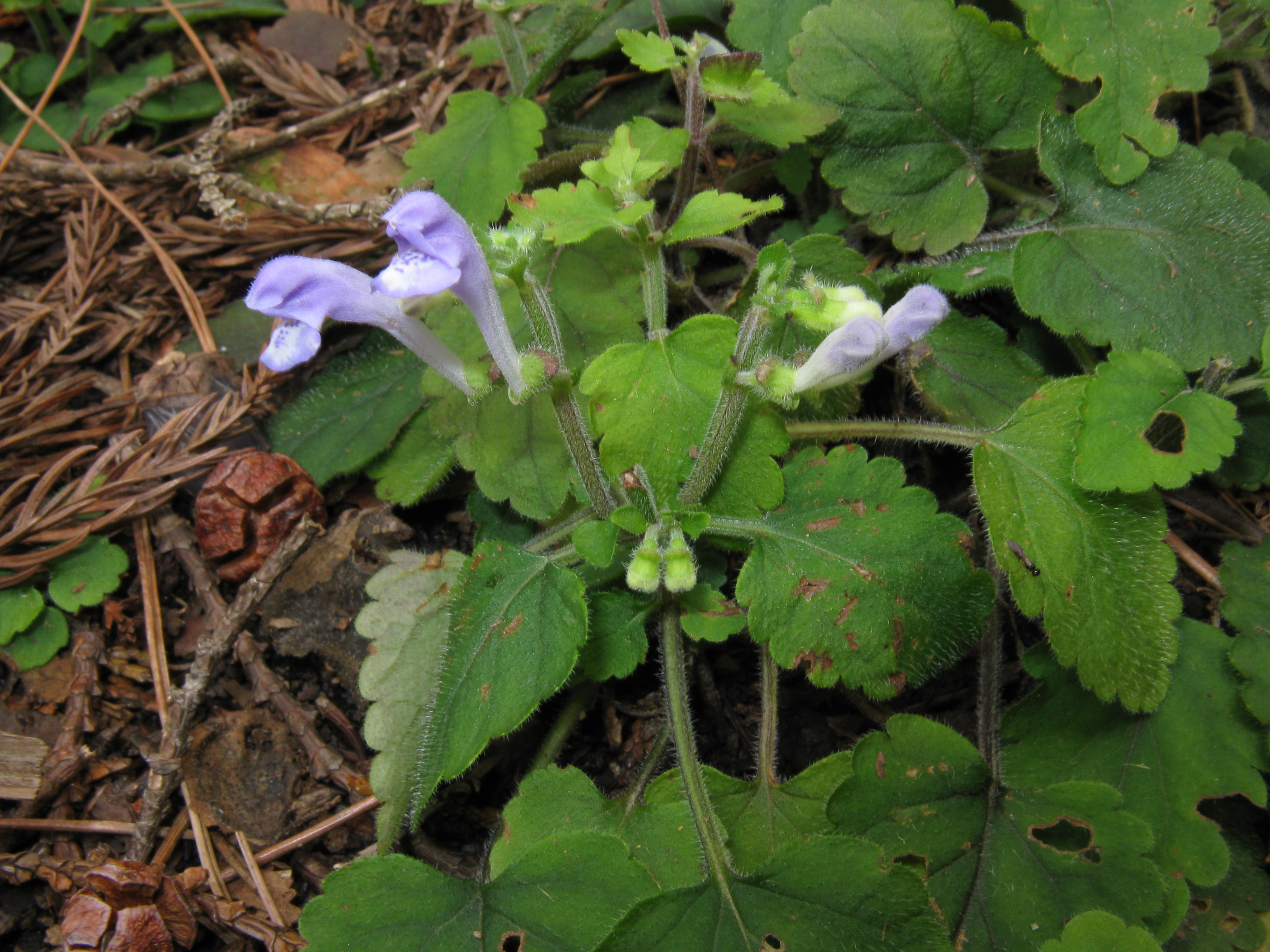 Scutellaria maekawae